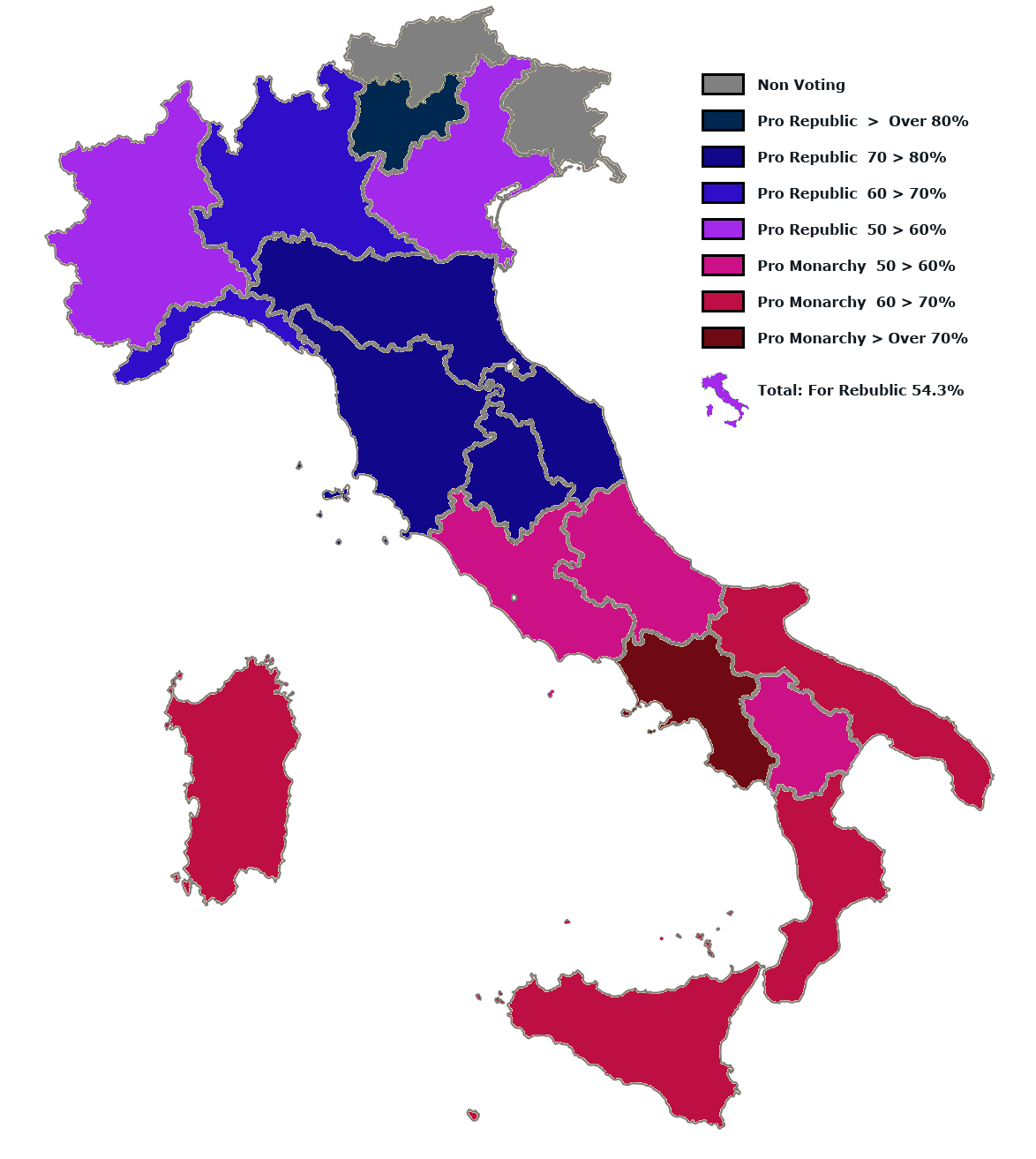 Mappa che mostra i risultati del referendum del 2 giugno 1946, mostrando le preferenze monarchiche o repubblicane di ogni regione. La Venezia Giulia e l'Alto Adige non parteciparono al referendum in quanto sottoposte ad occupazione militare alleata. Valle d'Aosta partecipò essendo ancora parte del Piemonte (FALSO: LA VALLE D'AOSTA ERA GIA' NATA IL 1° GENNAIO 1946). Abruzzi e Molise erano ancora un'unica regione. Dati dall'articolo Nascita della Repubblica Italiana.